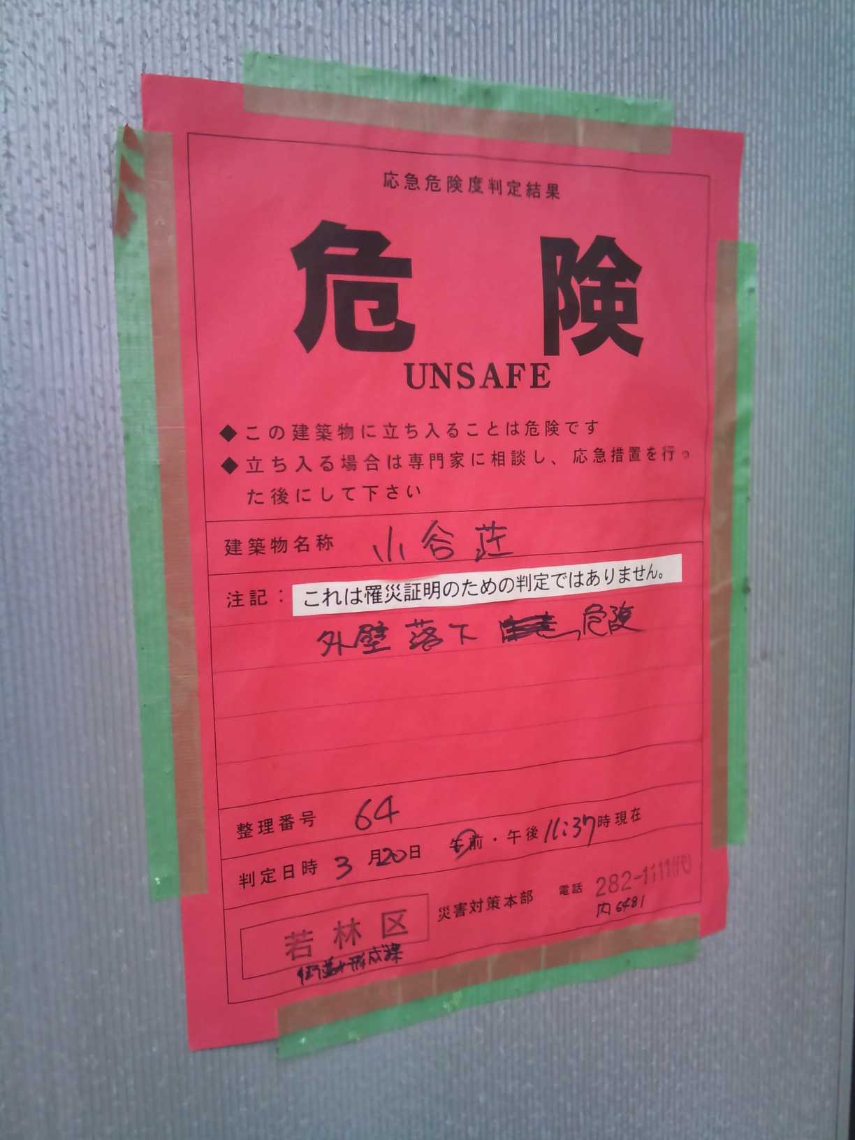 姉の引っ越しの手伝いなう。アパートの外壁ガタガタです。赤紙初めてみました！